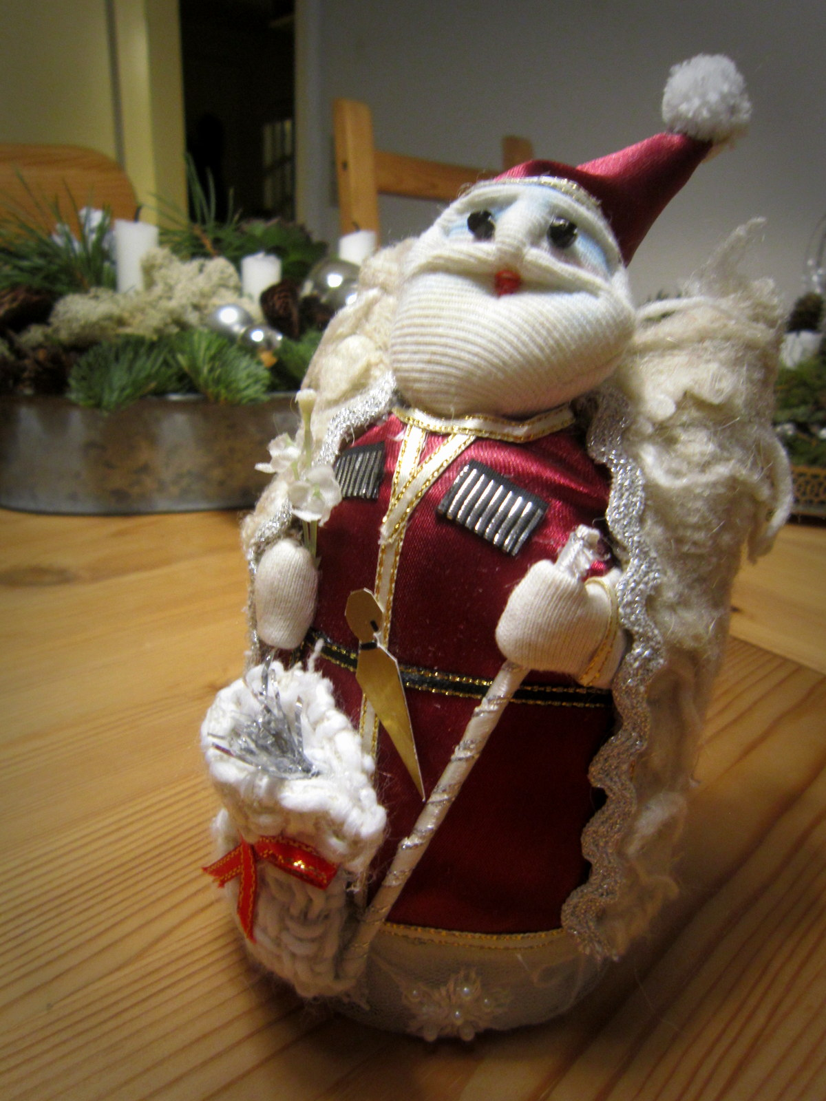 Fader Frost indkøbt i Georgien.